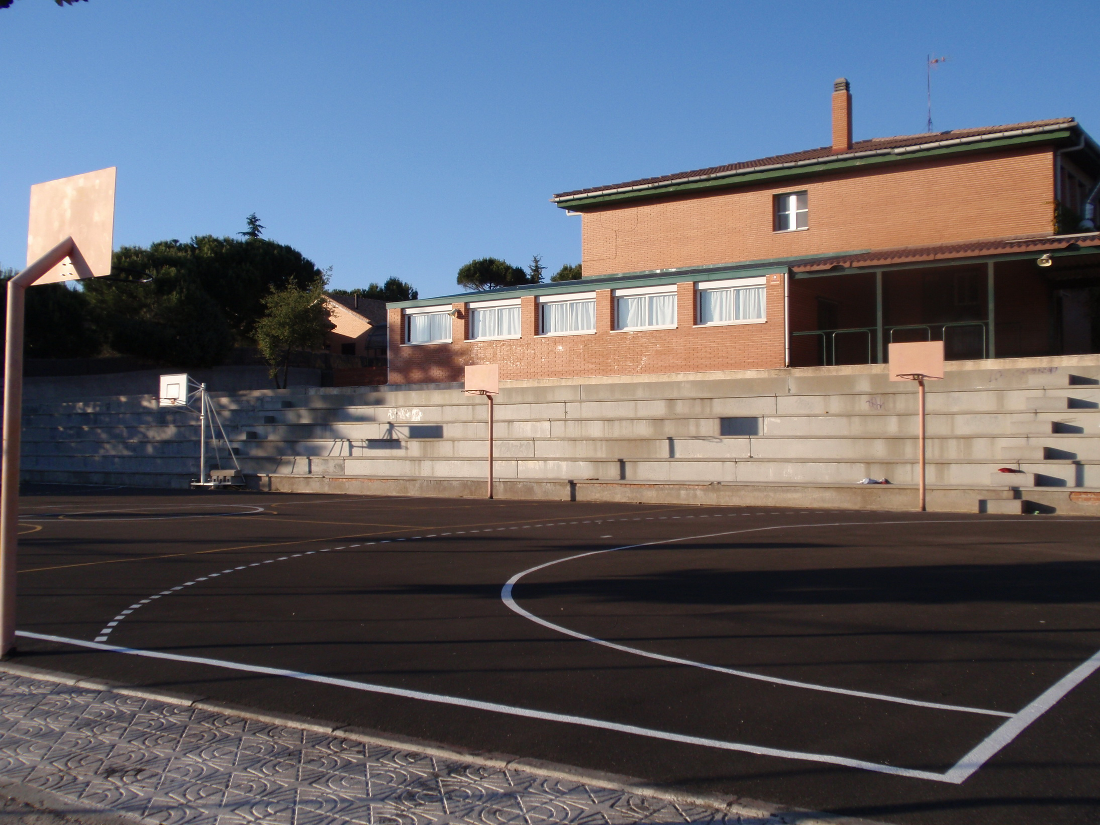 Torrelodones. CP Nuestra Señora de Lourdes. Patio de deportes.